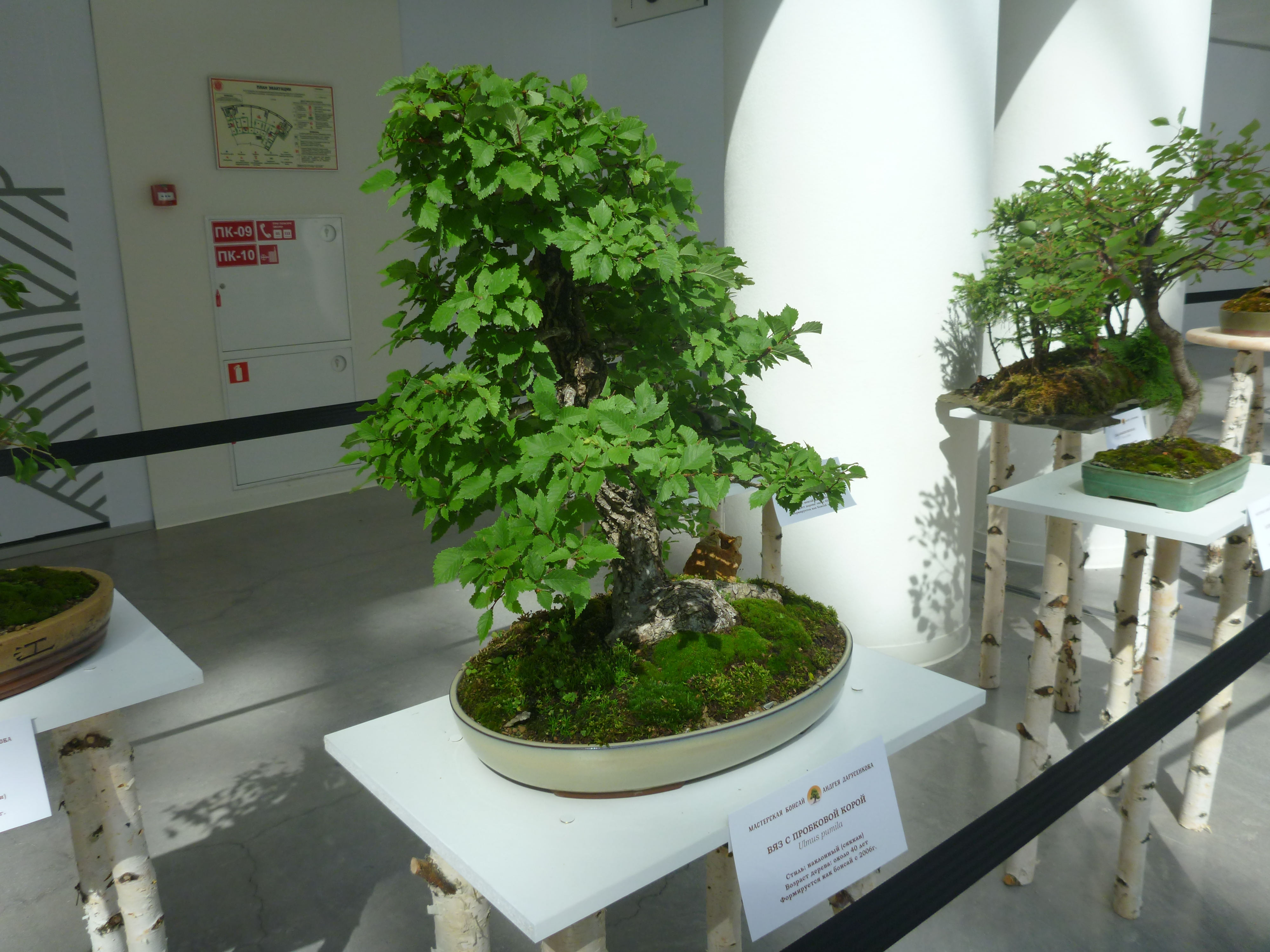 Вяз с пробковой корой бонсай в Ельцин-центре 2019 год